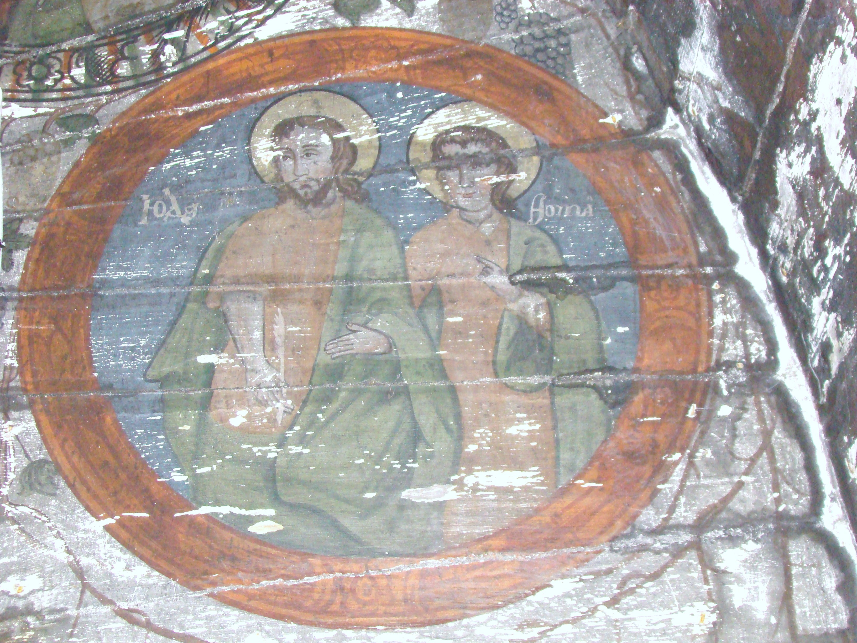 Biserica de lemn din Osoi